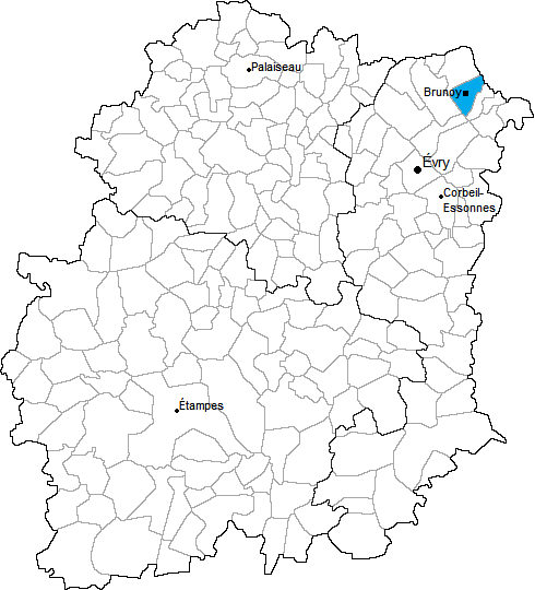 Carte de localisation du canton de Brunoy en Essonne (91)